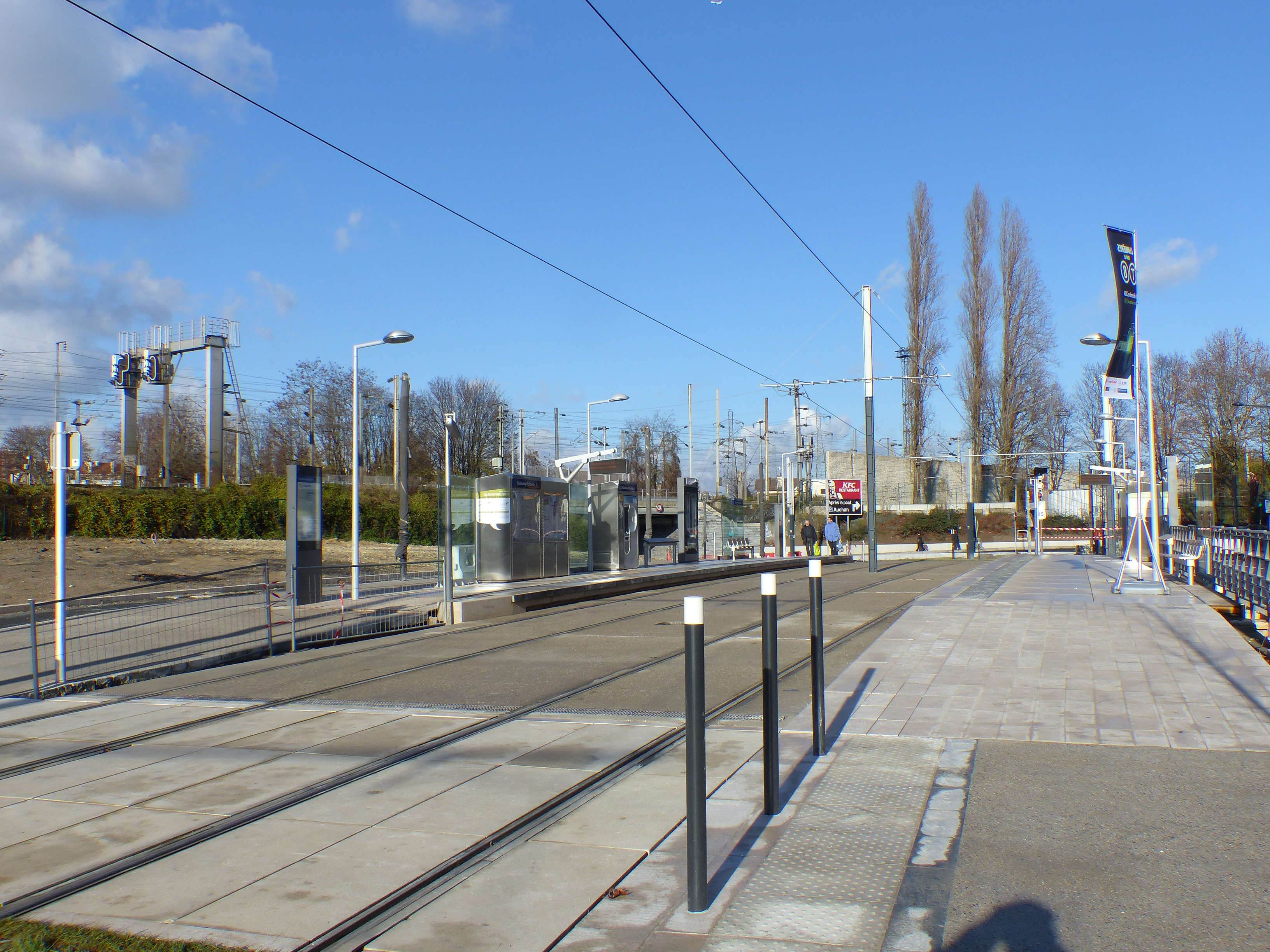 Aménagement de la station Delaunay-Belleville à Saint-Denis (Ligne T8) et, au fond, une potence de signalisation de la ligne SNCF Paris-Lille